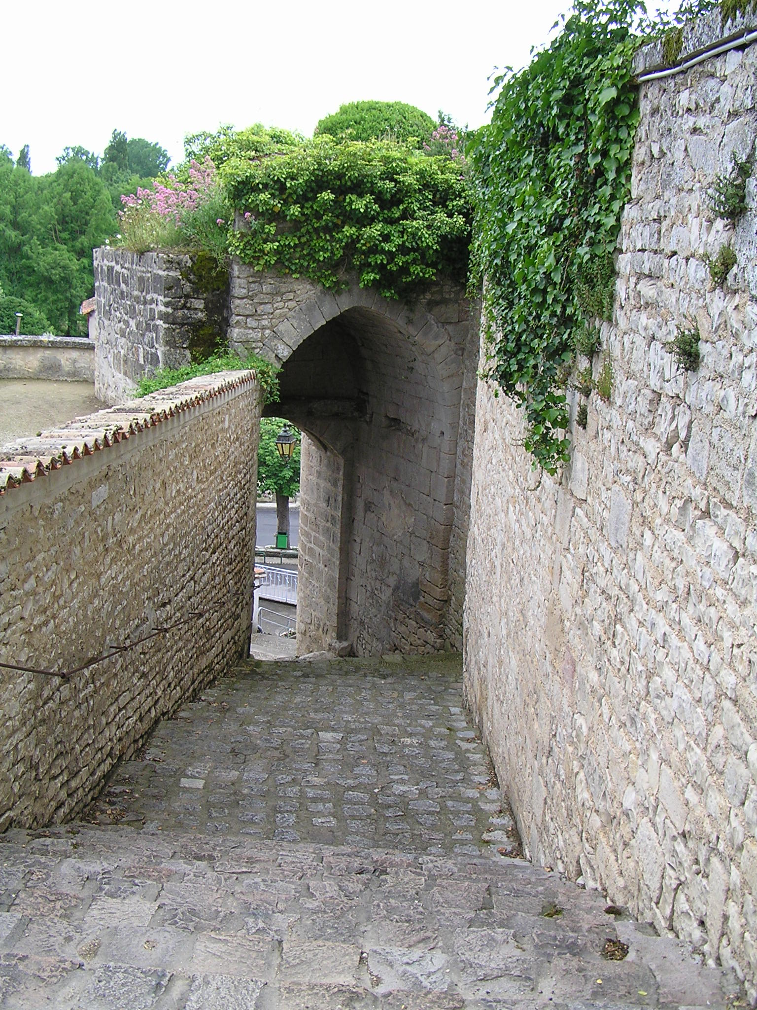 château de Montignac-Charente (16), France